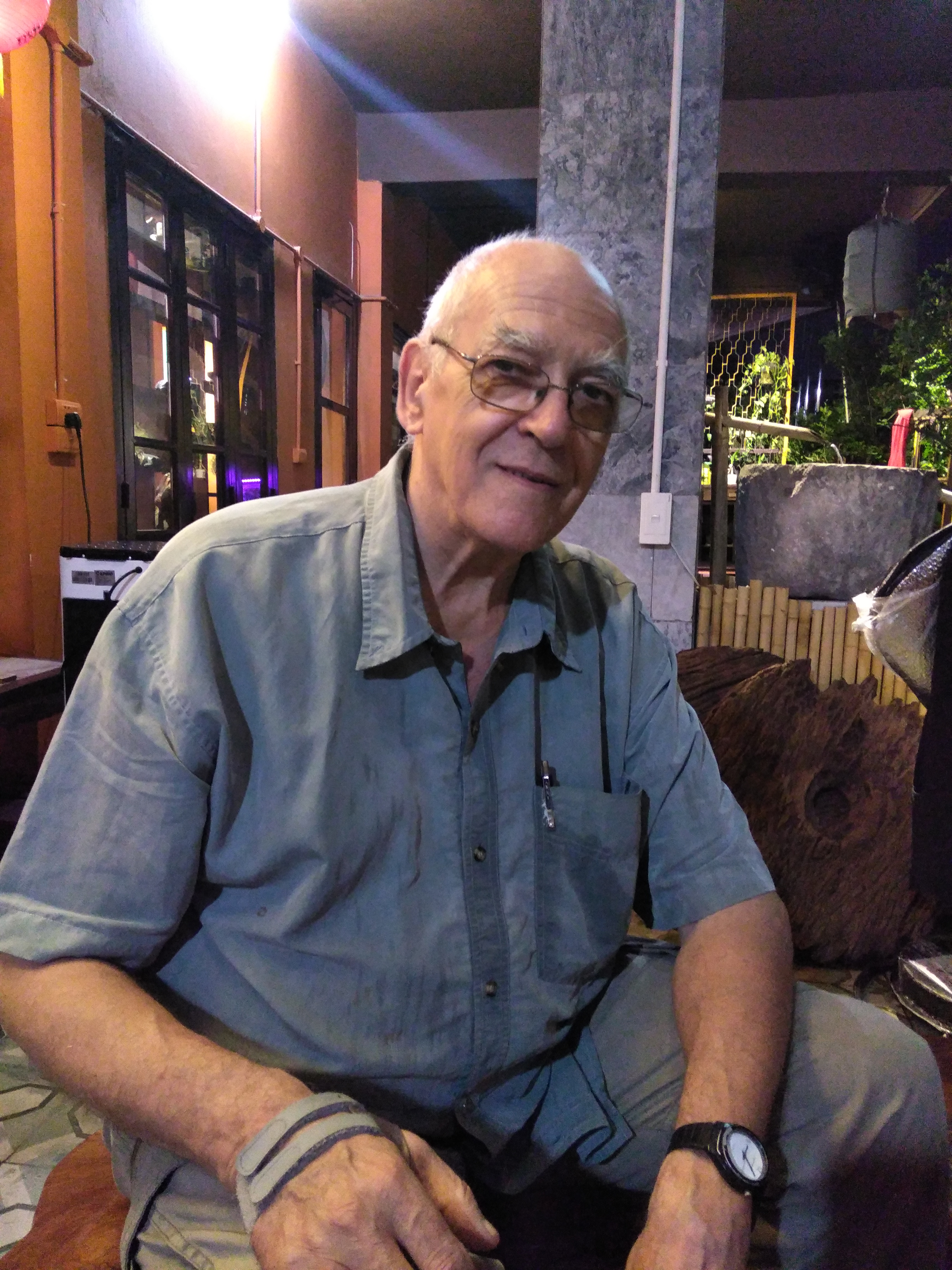 Hình ảnh chụp của Roby Bellemans